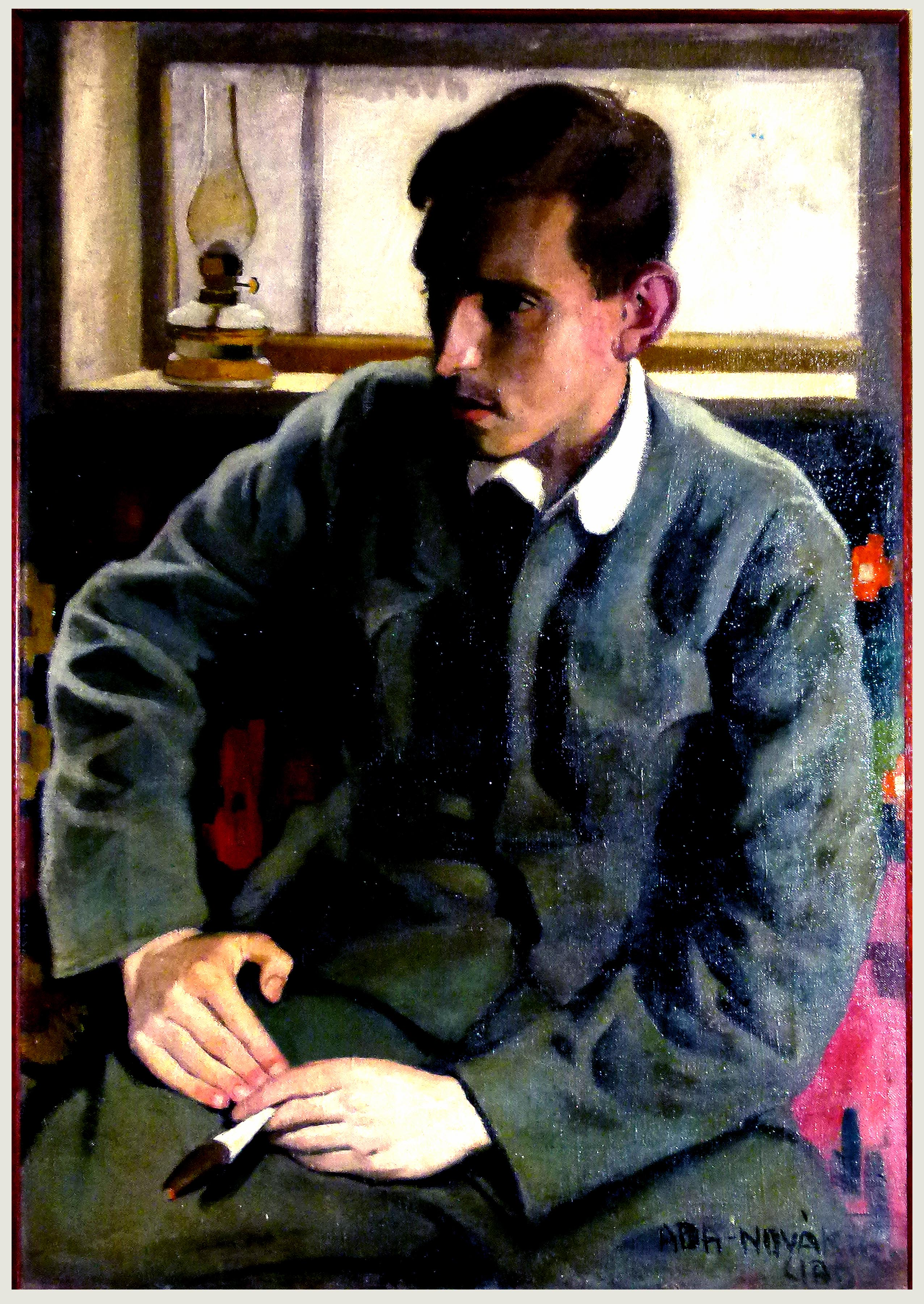 Aba-Novák Vilmos: Férfi képmás (olaj/vászon, 70/100 cm)